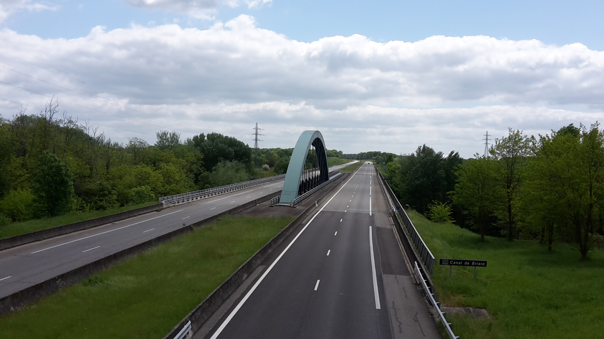 Autoroute A77 franchissant le canal de Briare, à Briare, département du Loiret, France.